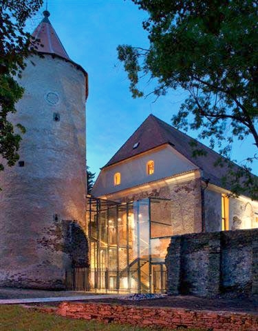 Hrad Soběslav